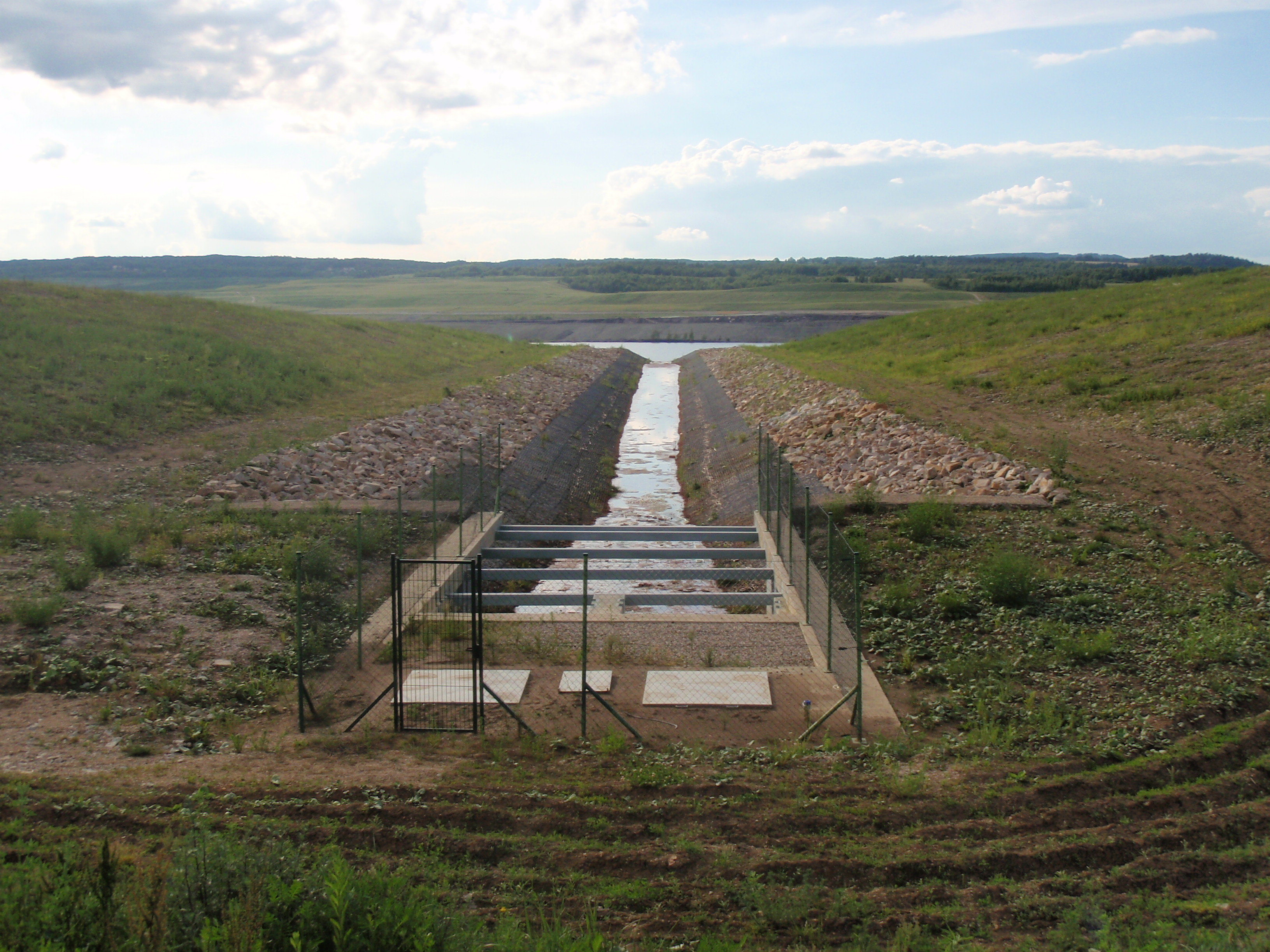 Napouštěcí kanál